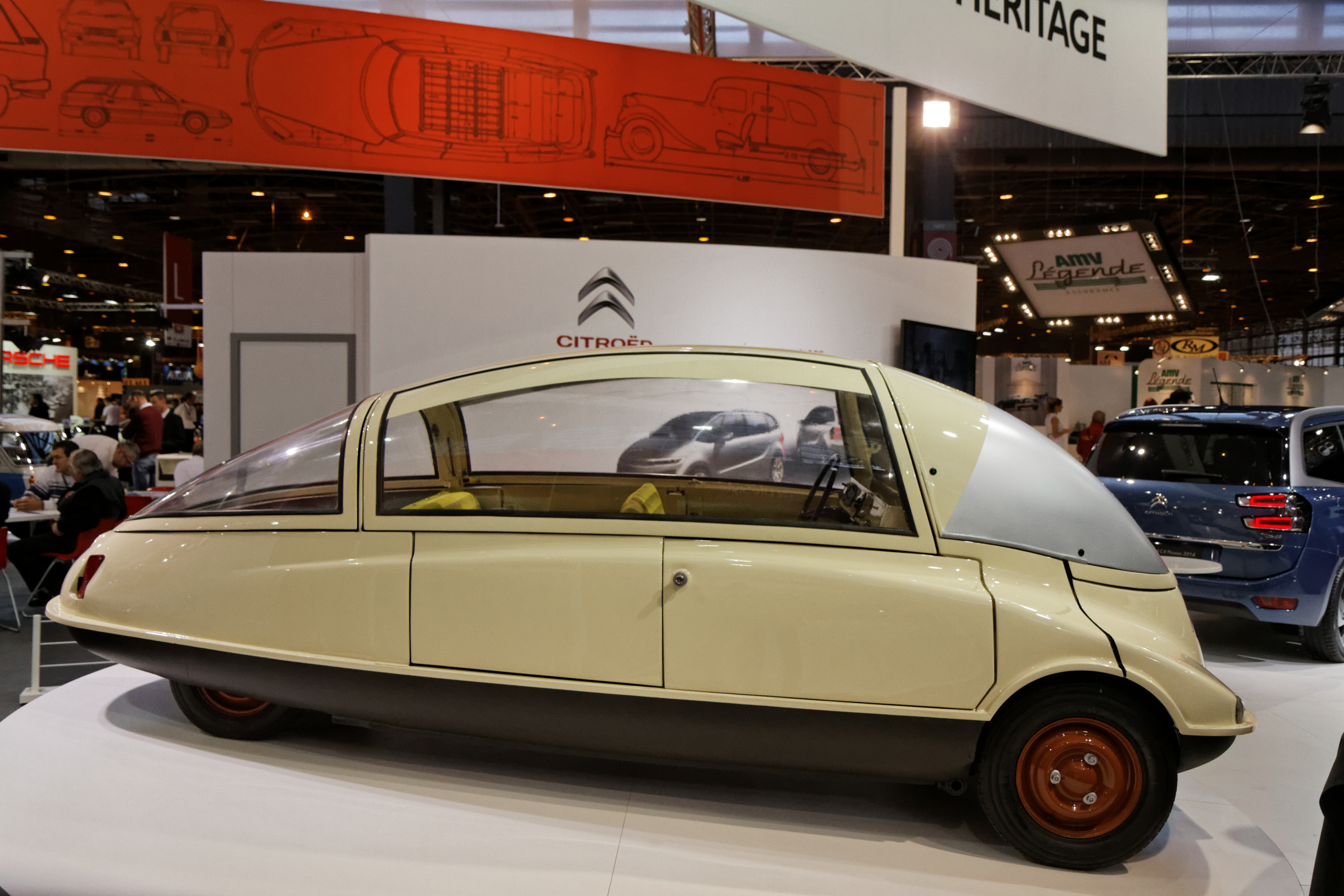 Une Citroën prototype C10 présentée lors du salon Retromobile 2014.